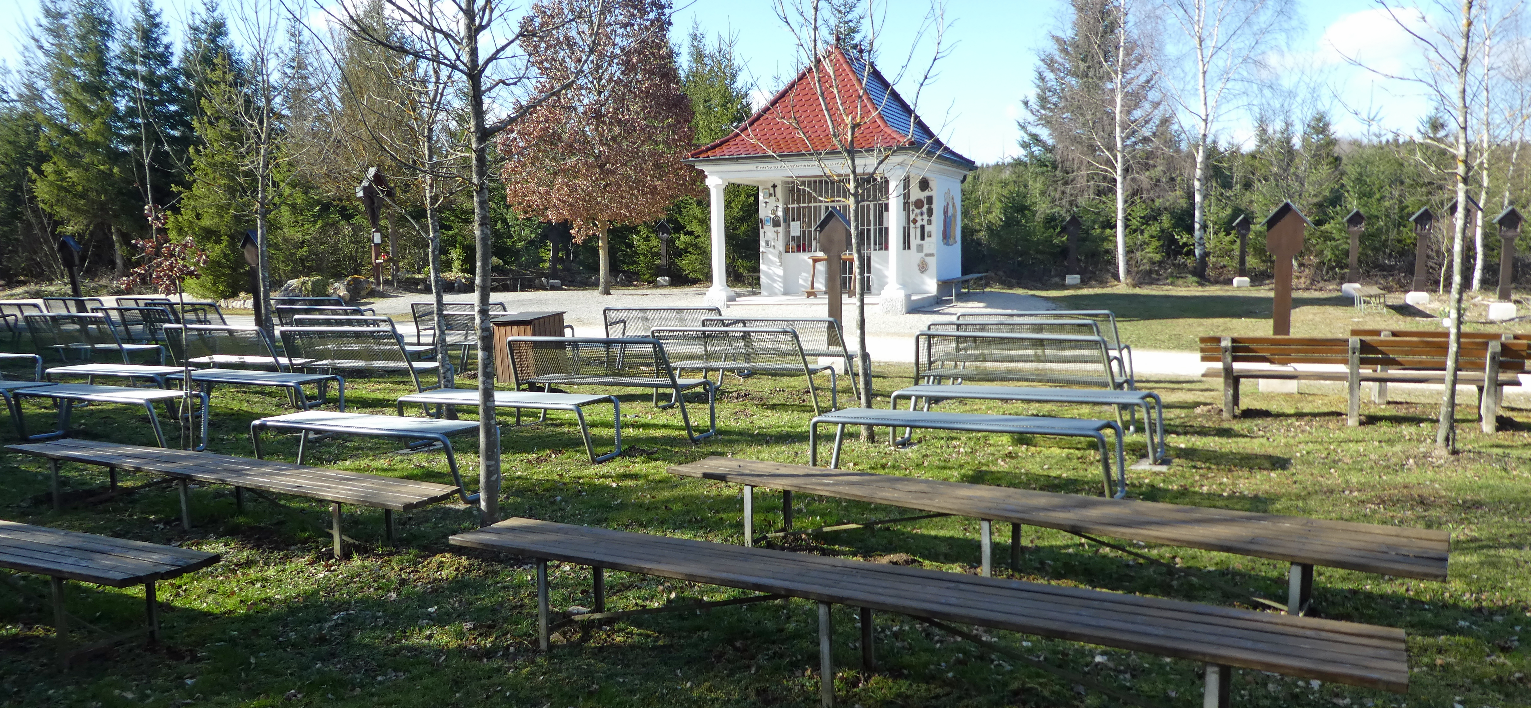 Maria Eich (Ebnat) - Gesamtanlage